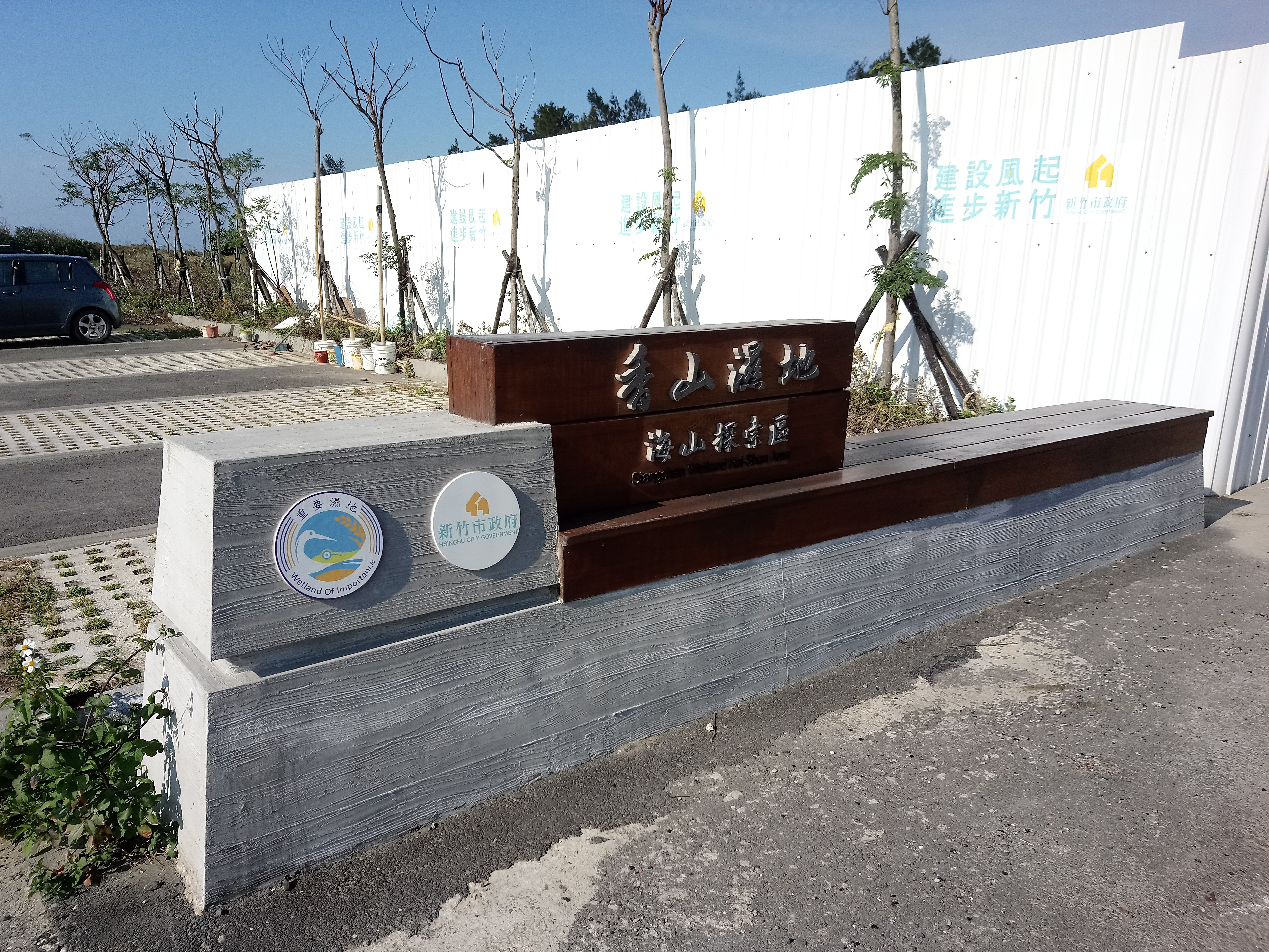 香山濕地海山探索區,台灣省新竹市香山區香山聯里朝山里